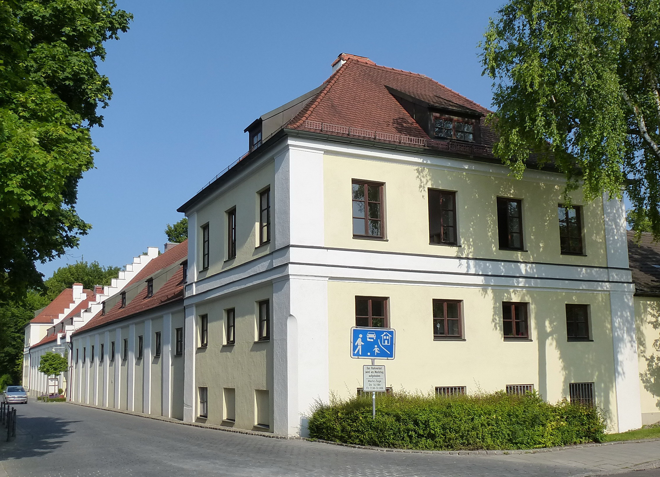 Ismaning ("Daschanwesen", ehem. Schloss-Ökonomiegebäude, Kirchplatz)